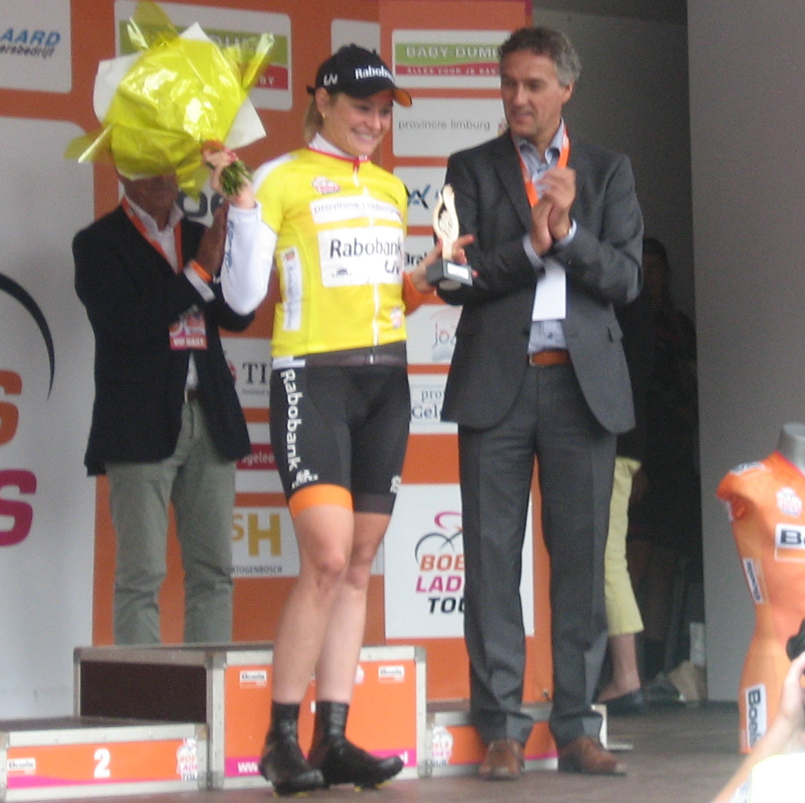 Roxane Knetemann, winnares van het bergklassement van de Boels Ladies Tour 2016, op de Cauberg in Valkenburg, Limburg.